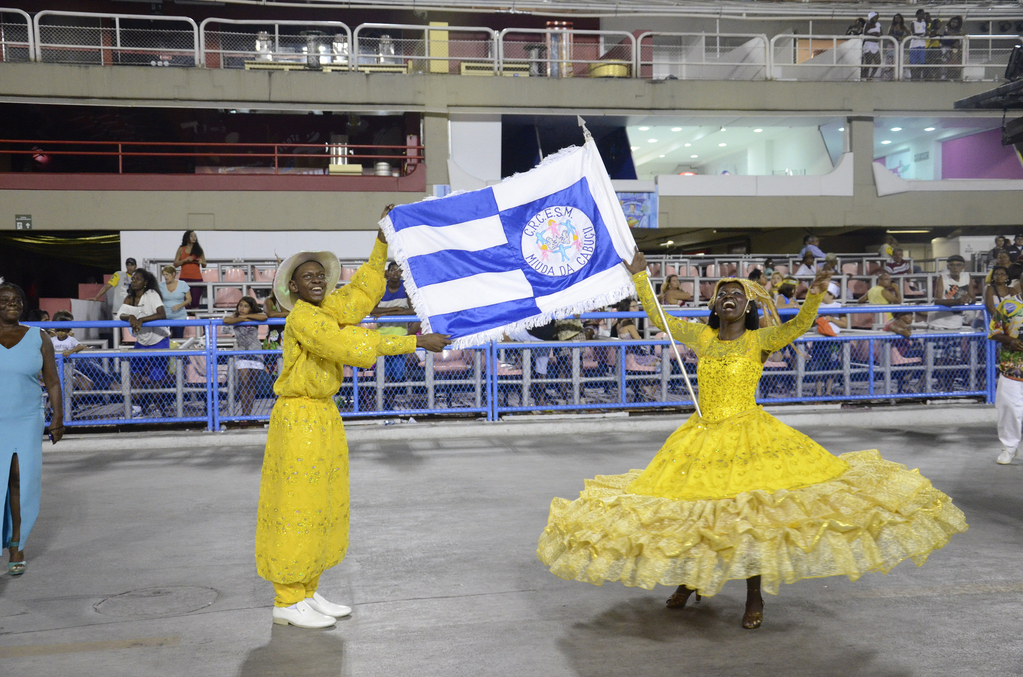 Rio de Janeiro - Pequenos sambistas fecham desfiles na Marquês de Sapucaí.